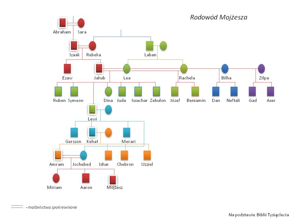 Rodowód: od Abrahama do Mojżesza